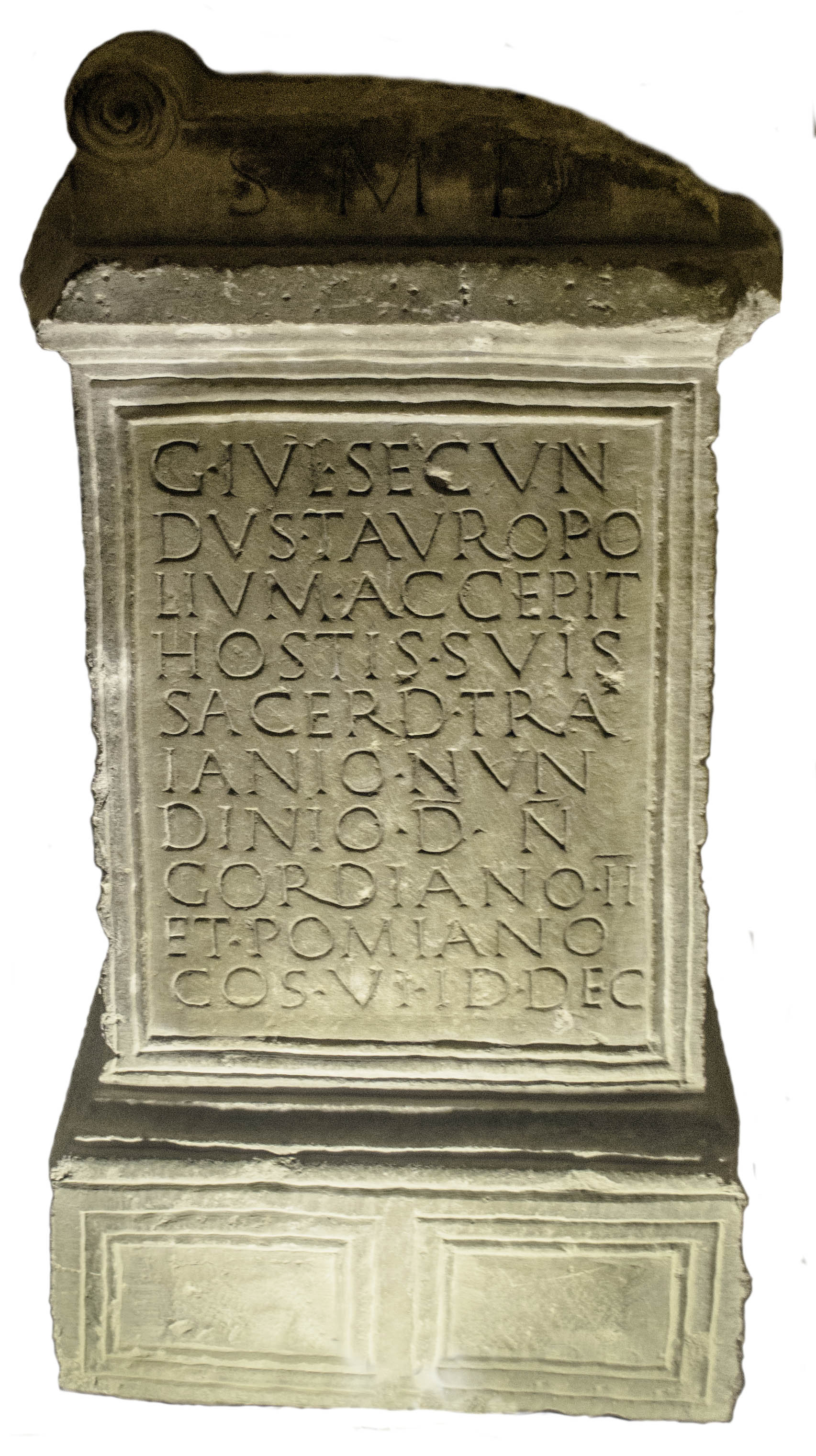 Autel taurobolique de Gaius Julius Secundus, 241 ap. JC, marbre. CIL XIII, 512. Musée Eugène-Camoreyt, Lectoure, Gers, France.